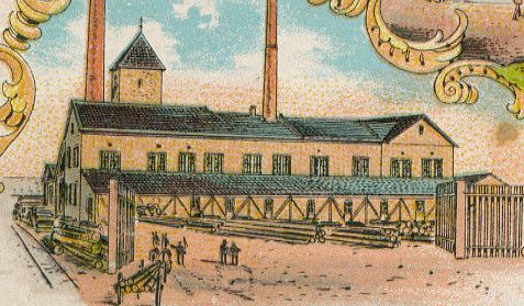 Detail einer Chromolithographie auf einer Ansichtskarte aus Wörth am Main: Holzwarenfabrik Cäsar Fuchs & Cie (ehemaliges Kurfürstliches Schloss), Ansicht des Westflügels (Landseite), links im Hintergrund Bergfried. Die Karte ist 1907 gelaufen.